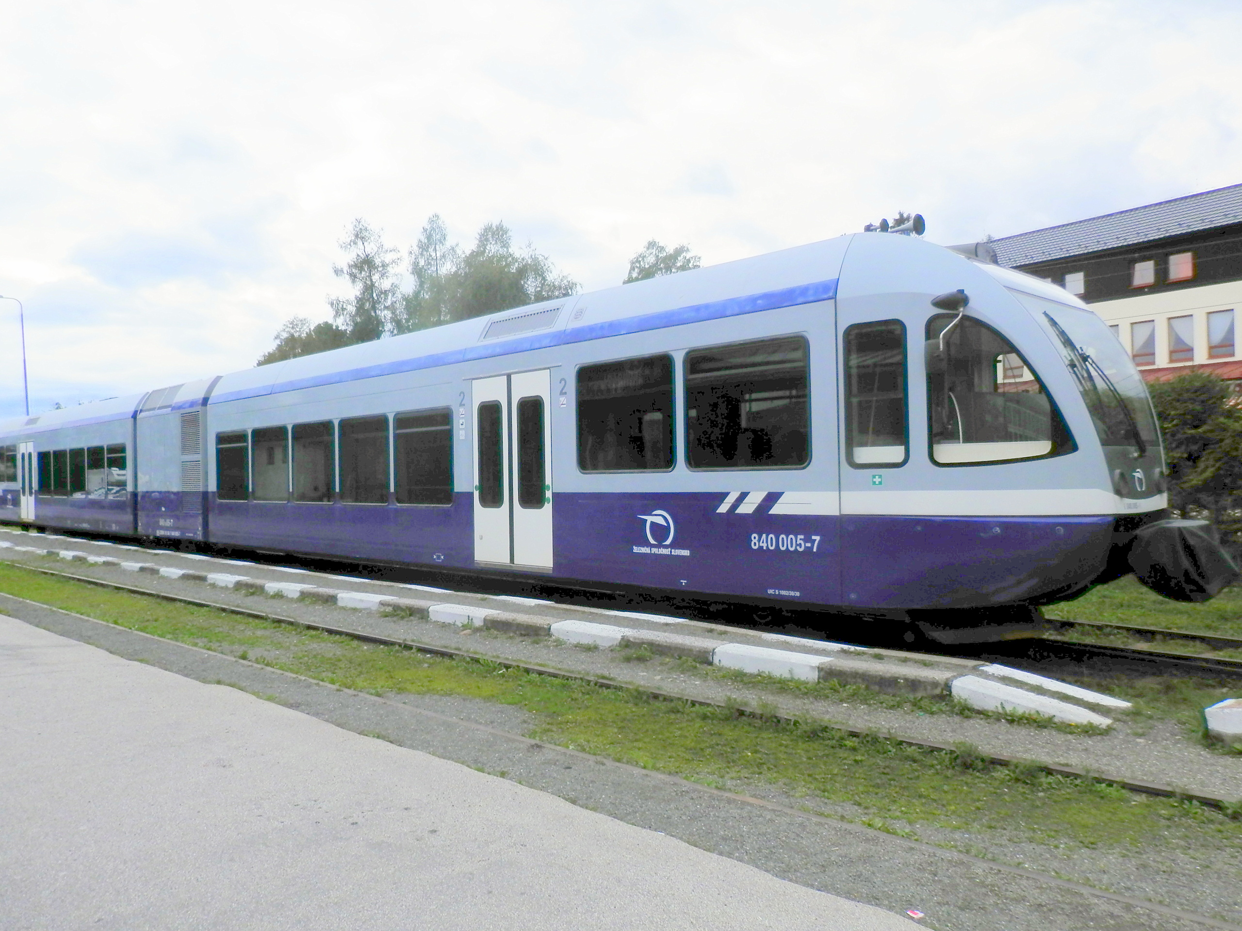 Železničná stanica. Tatranská Lomnica, mesto Vysoké Tatry.